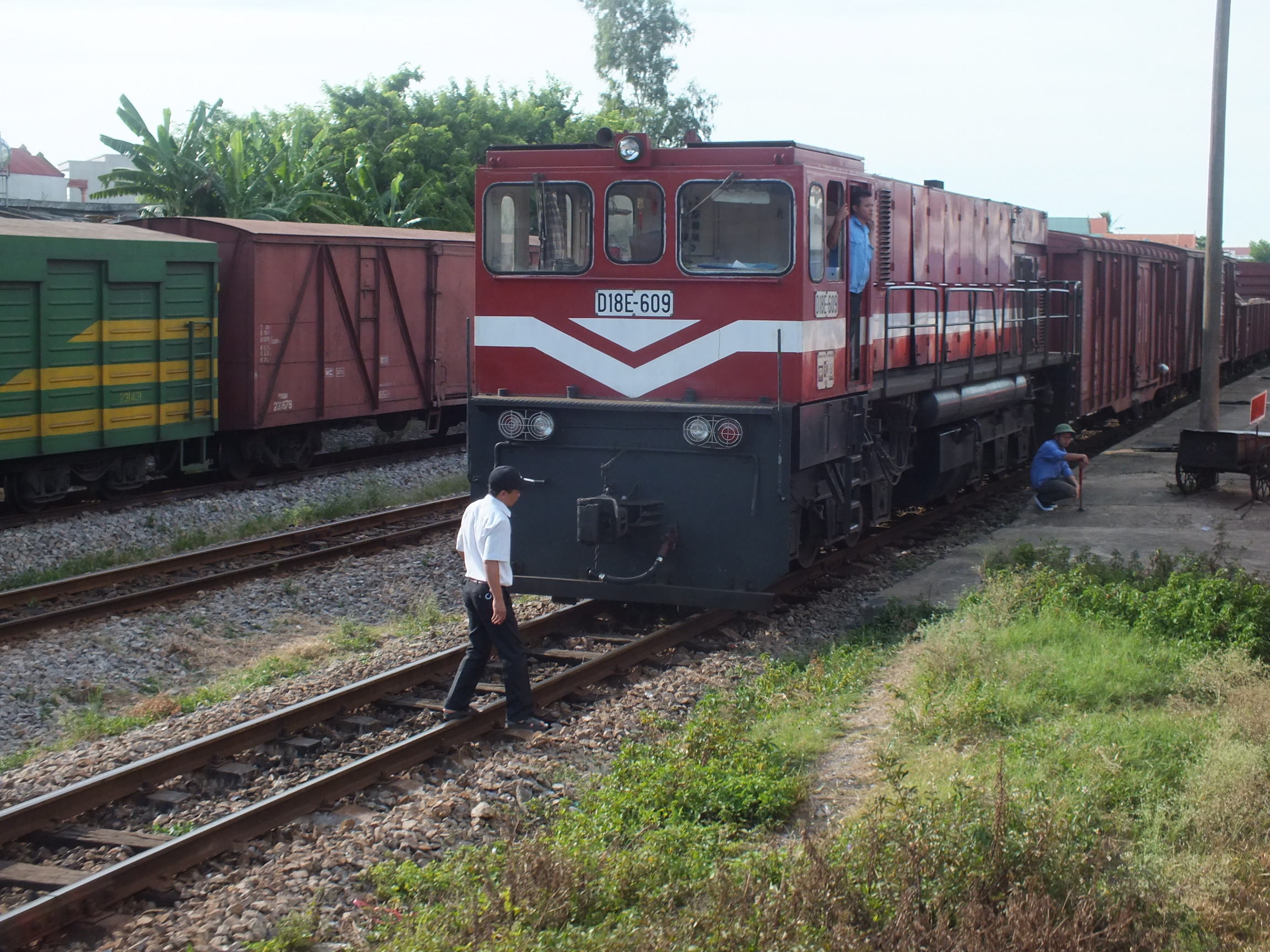 2013-07-16 North–South Railway (Vietnam) D18E-609